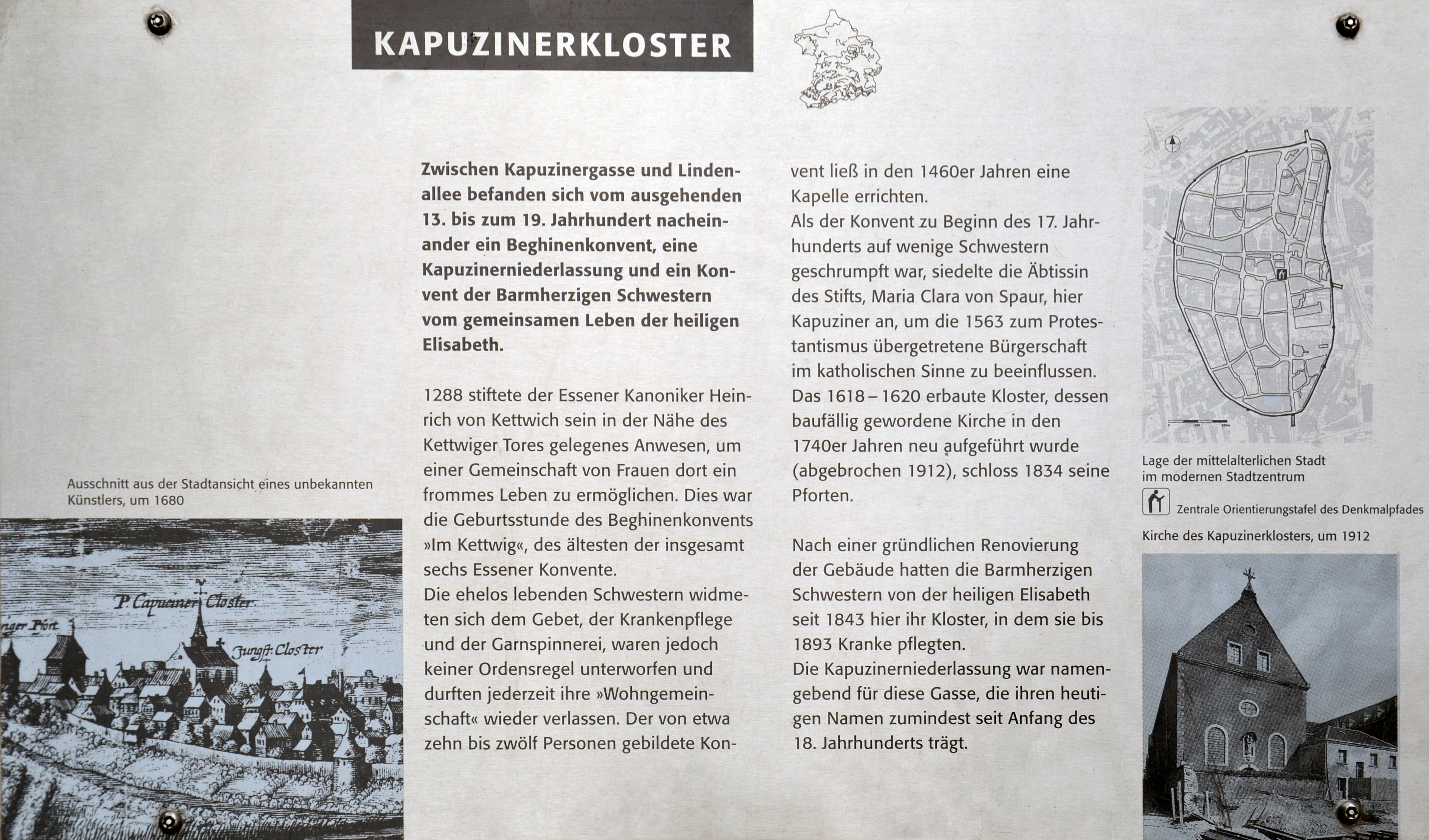 Gedenktafel an das ehemalige Kapuzinerkloster in Essen